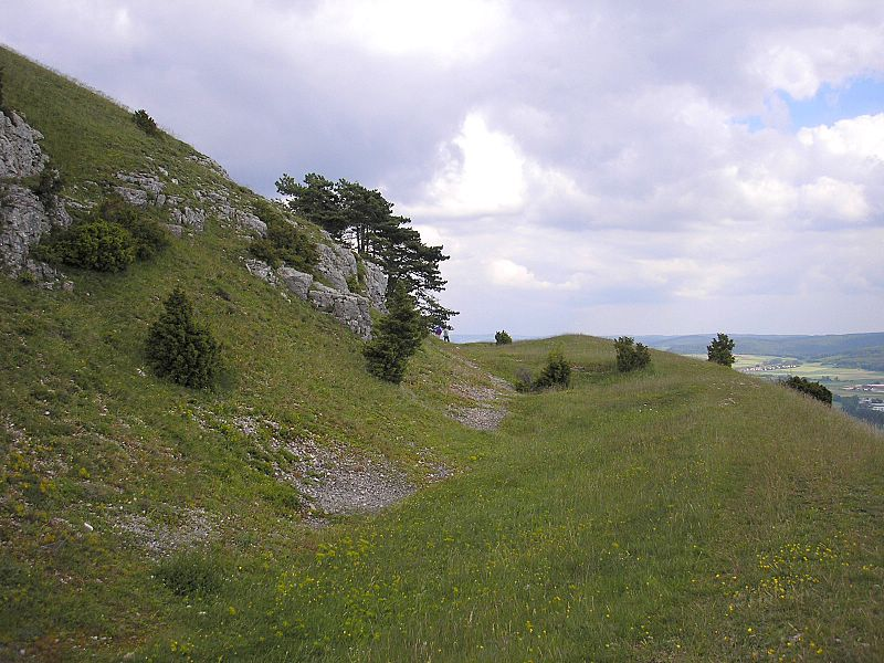 Ipf über Bopfingen (Ostalb, BW). Der Hanggraben unter dem Gipfelplateau (Westseite)